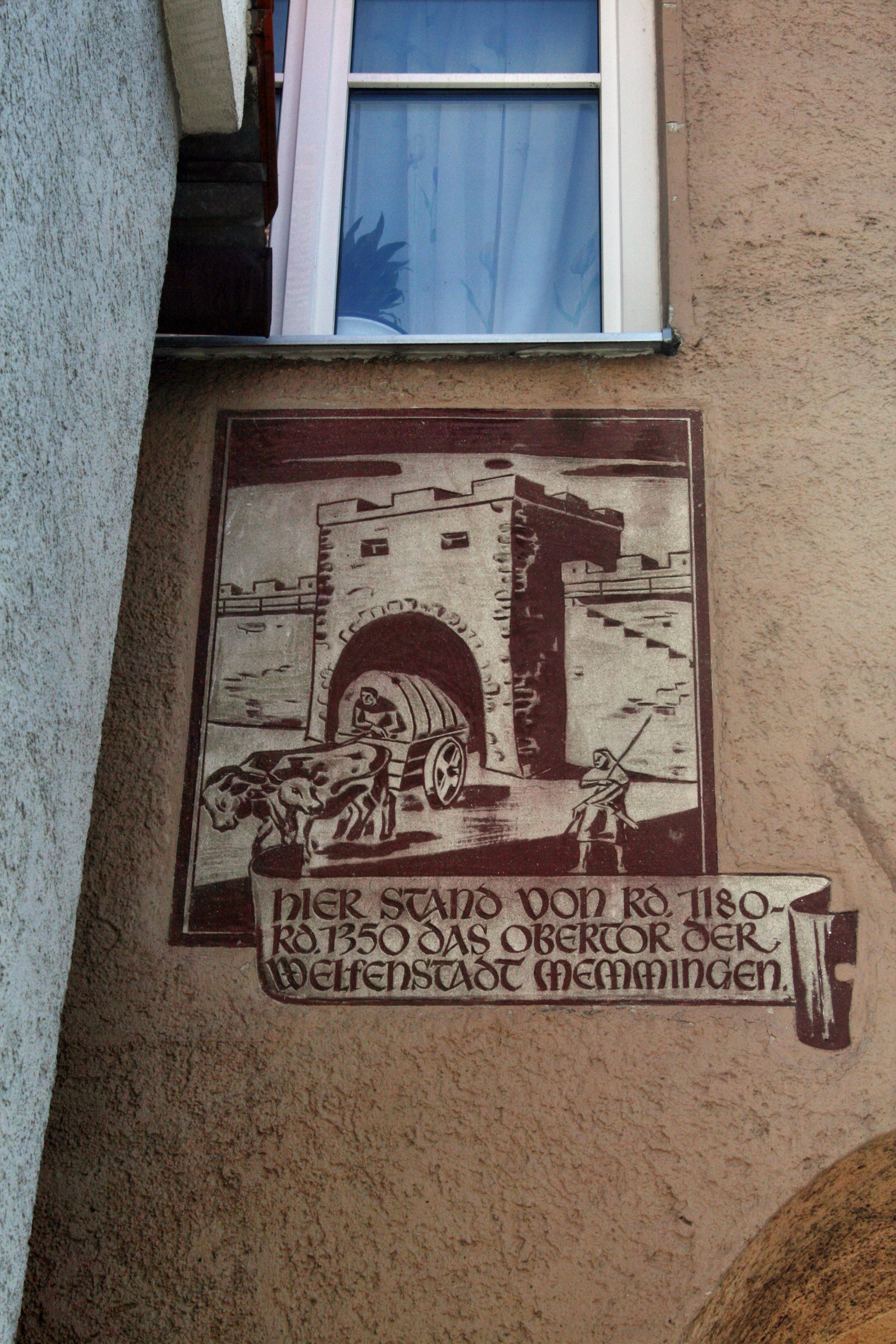 Gemälde zum ehemaligen Obertor